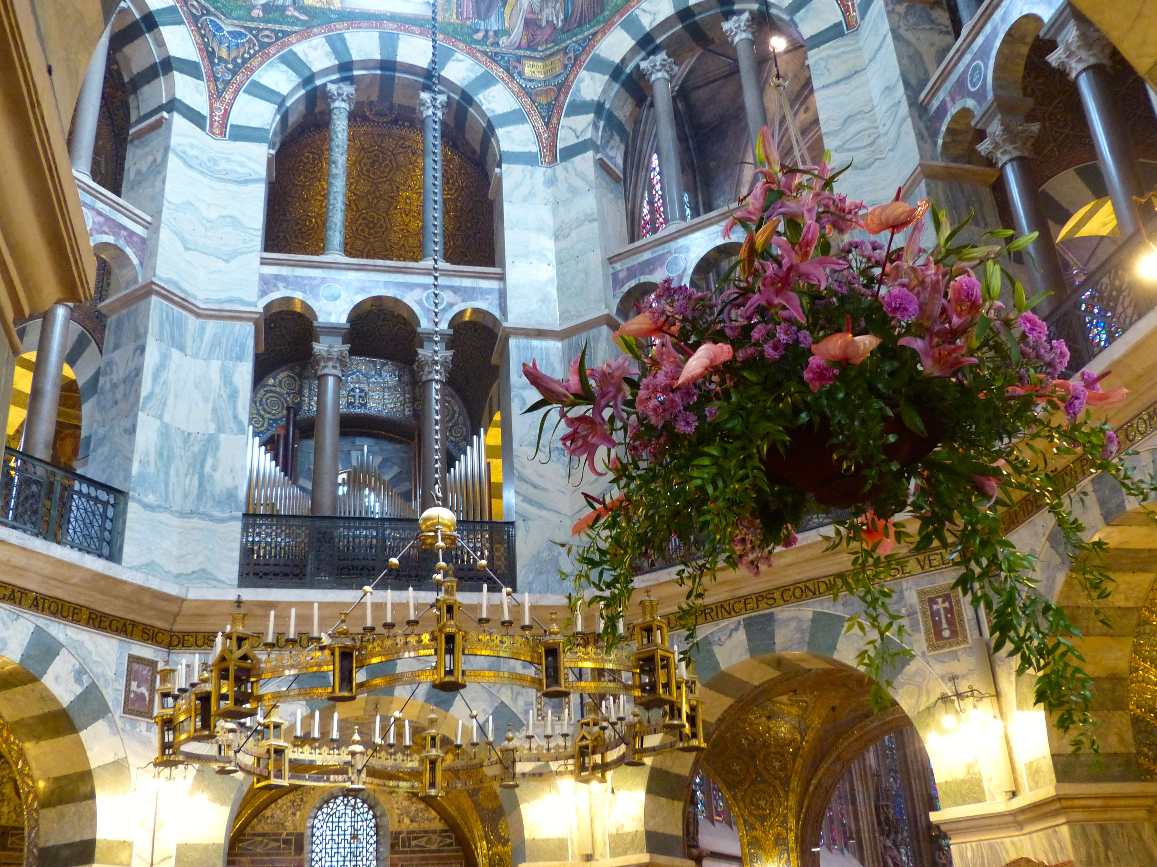 Aachener Dom: Blick ins Oktogon